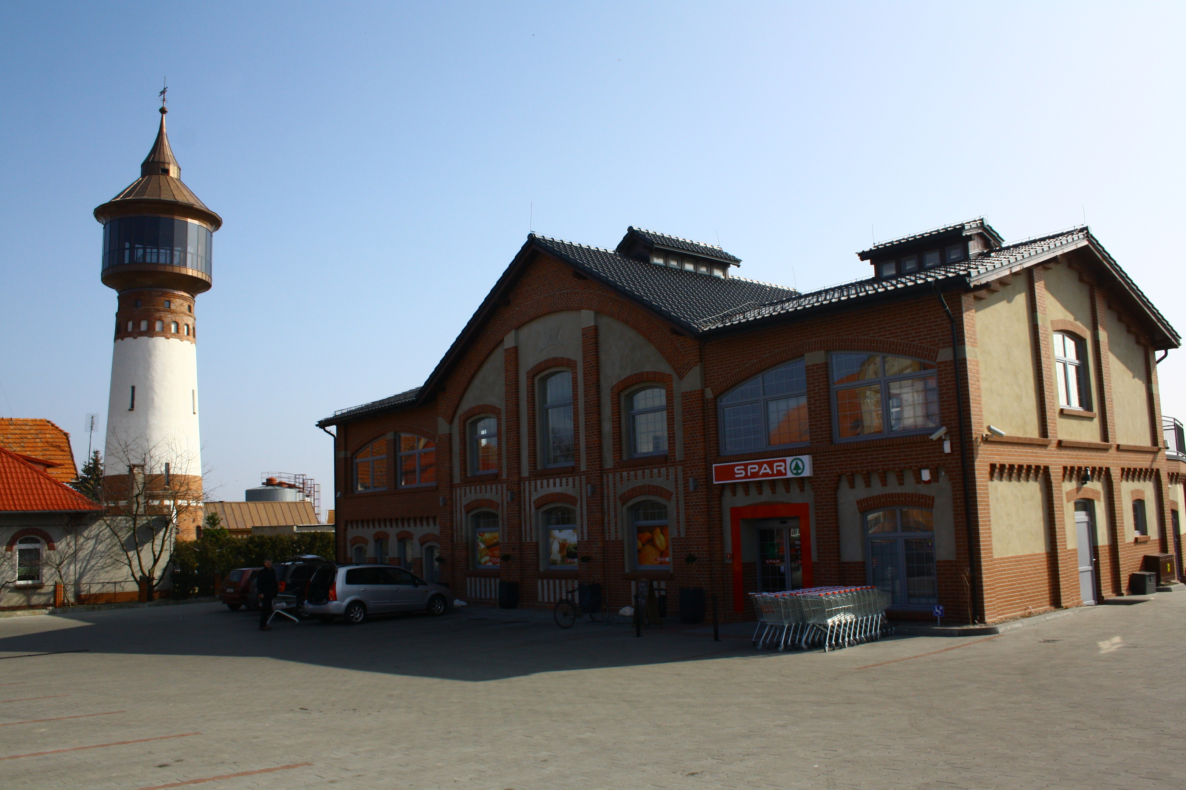 Der alte Wasserturm und das alte Gaswerk von Łobżenica (Lobsens). Beide Objekte 2012 restauriert.